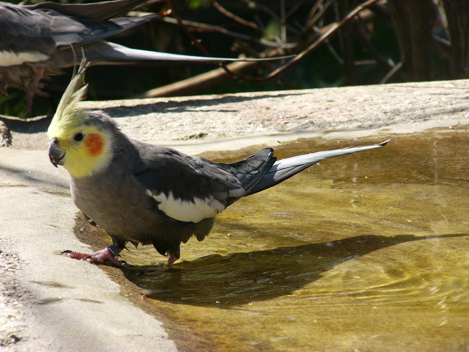 Badende Nymphensittiche im Hofer Zoo